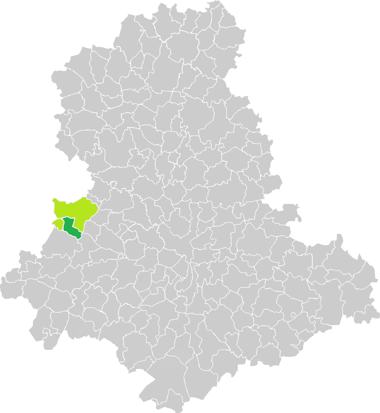 Carte de situation de la commune de Chaillac-sur-Vienne (en vert foncé) dans le votre Canton (en vert clair) sur une carte des communes de la Haute-Vienne